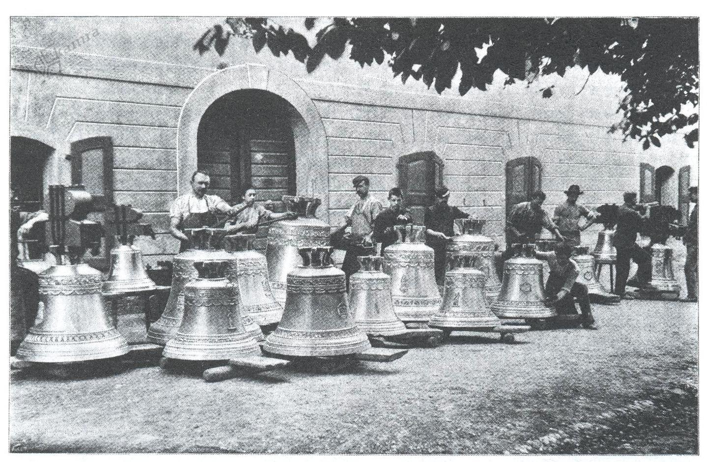 Pred Samassovo zvonarno v Ljubljani.